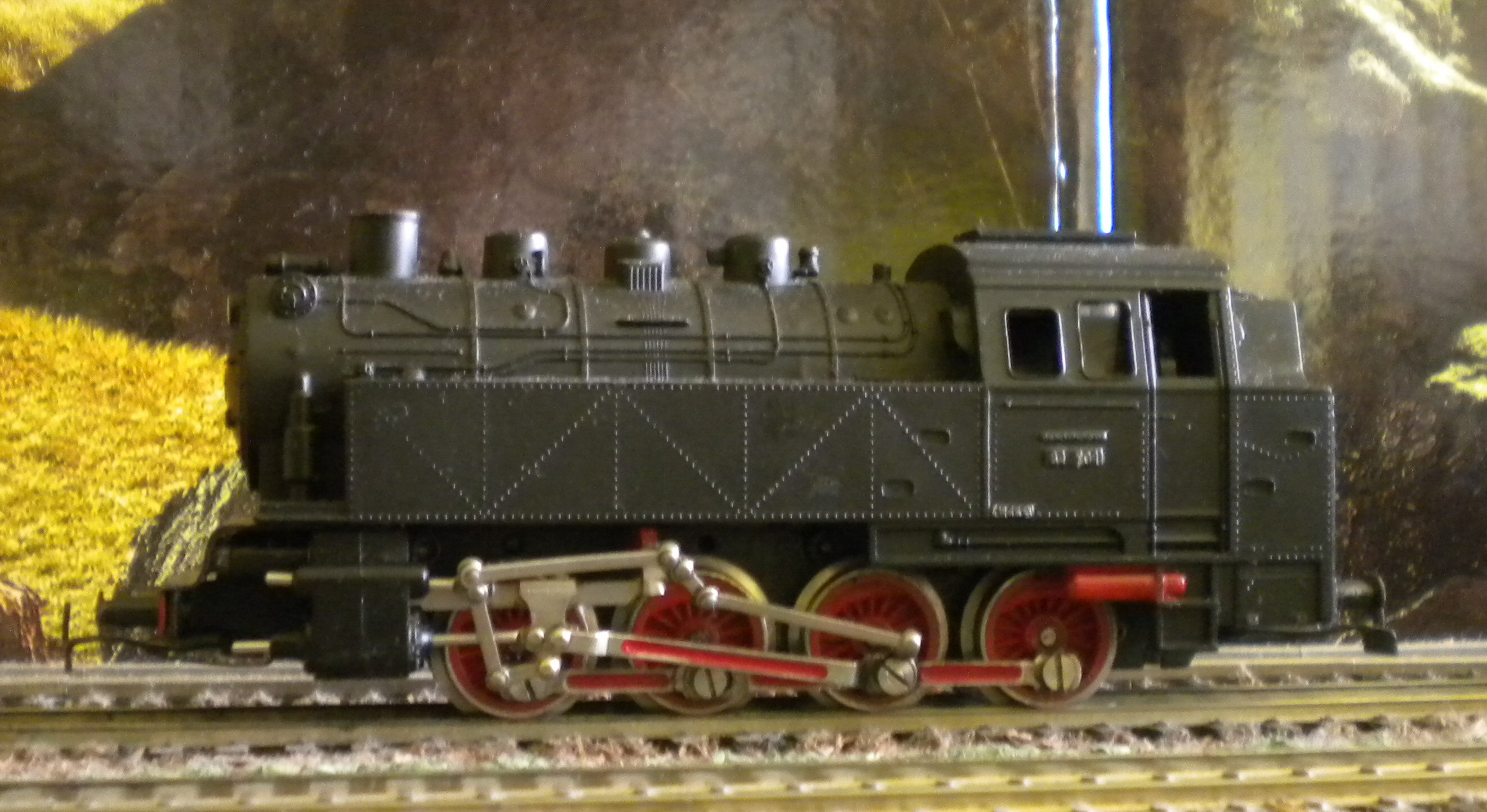 Dampflokomotive piko